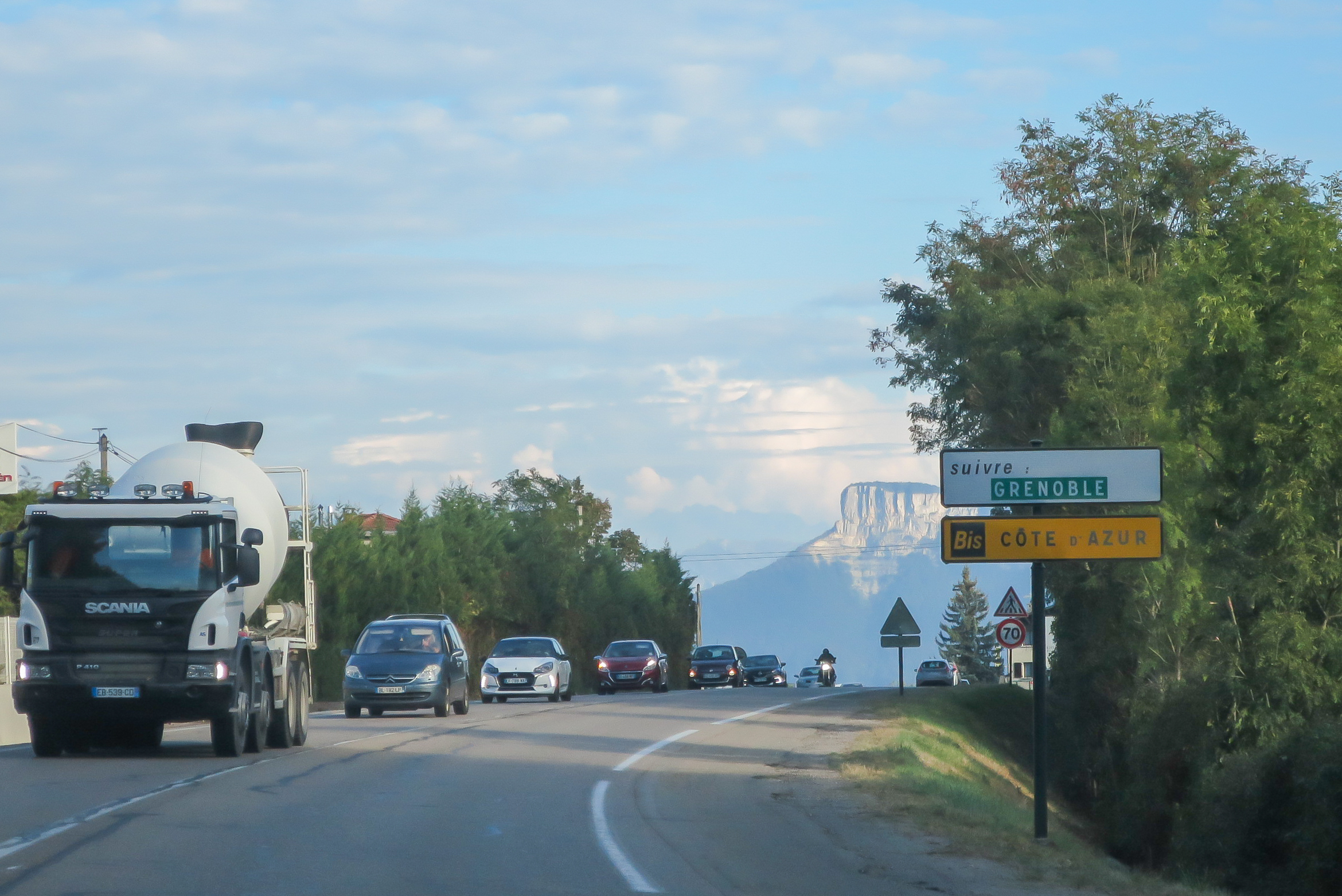 D1085 (ex RN 85) - Sens N-S - à Beaucroissant - Direction Grenoble